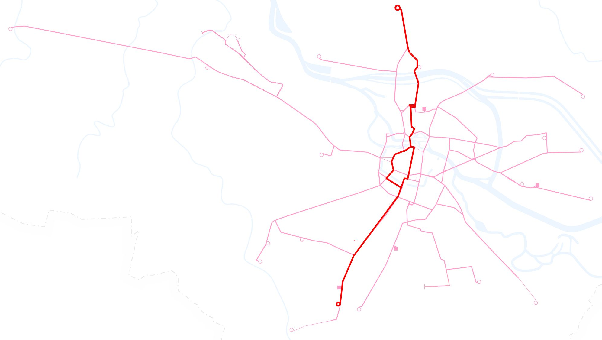 Poglądowa mapka przebiegu linii tramwajowej 7 we Wrocławiu.